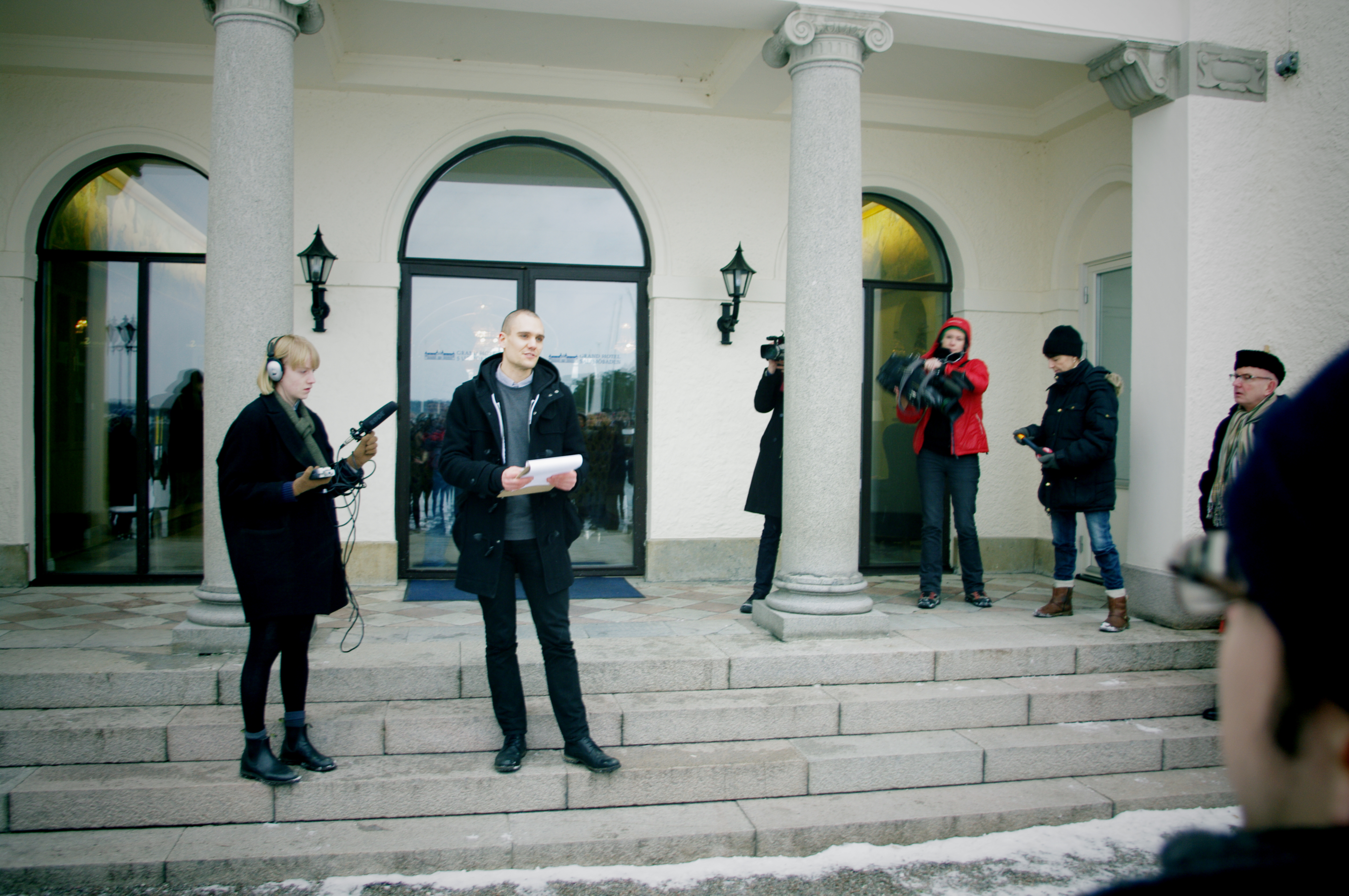 Grand Hotel Saltsjöbaden Martin från förbundet Allt åt Alla talade kort om den historiska bakgrunden till vår tids klassfred, från upptakten till saltsjöbadsavtalet till MBL/LAS/osv och dagens kris.